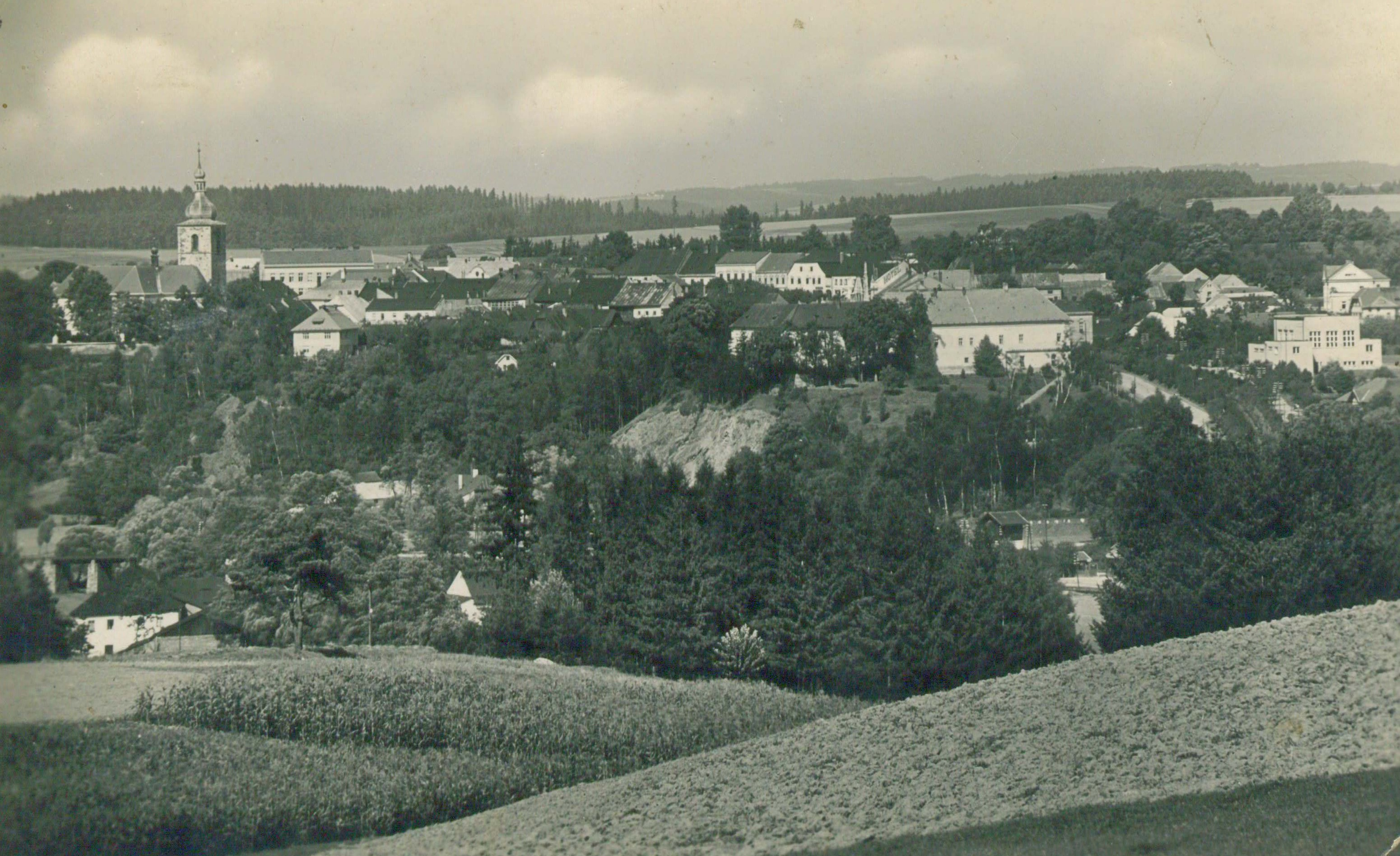 Přibyslav, pohled od Poříčí.